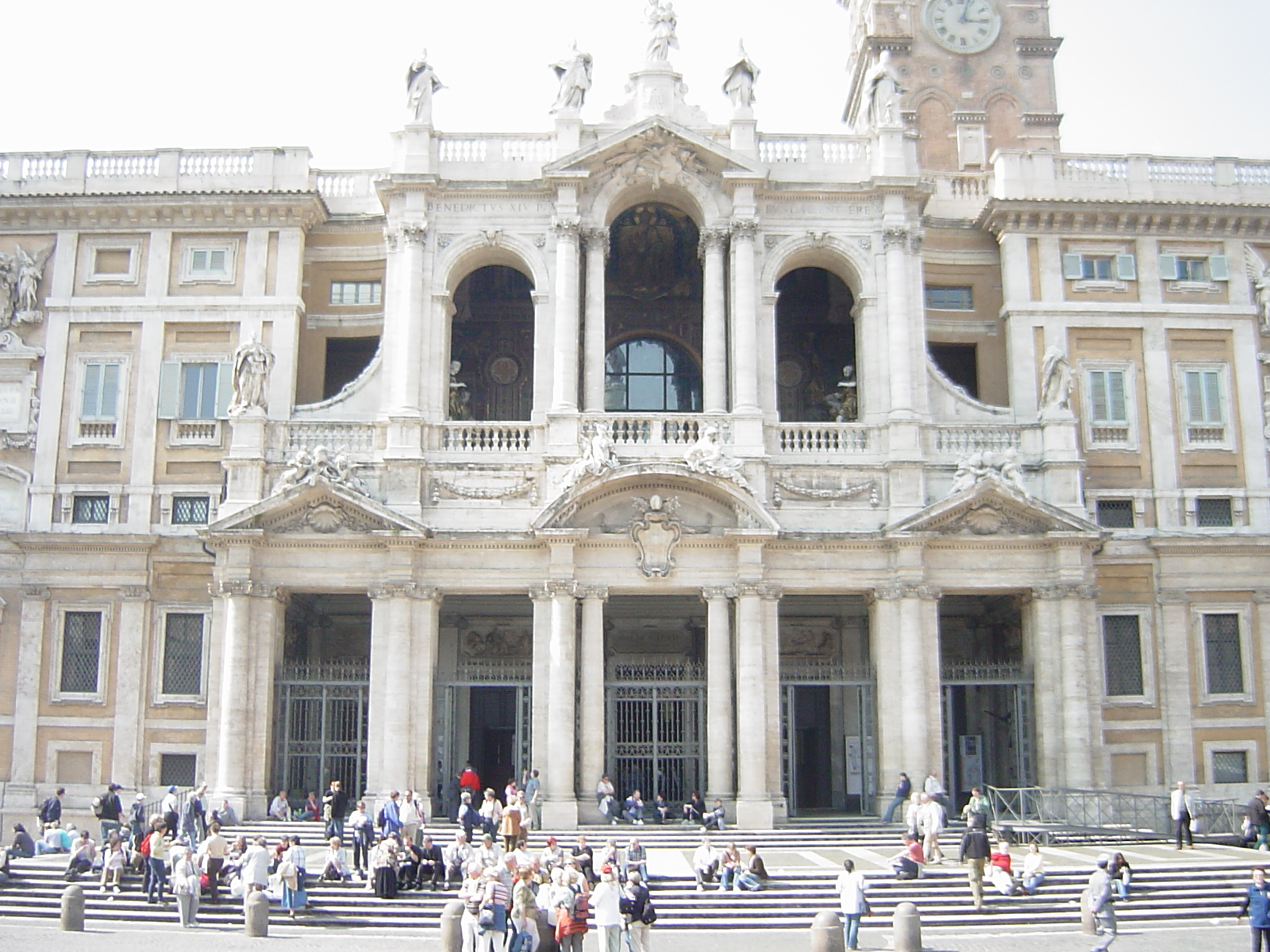 Façade avant de la Basilique Ste Marie Majeure (Rome)